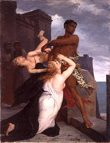 Edouard-Théophile Blanchard, La mort d'Astyanax, 1868, Paris, Ecole Nationale Supérieure des Beaux-Arts